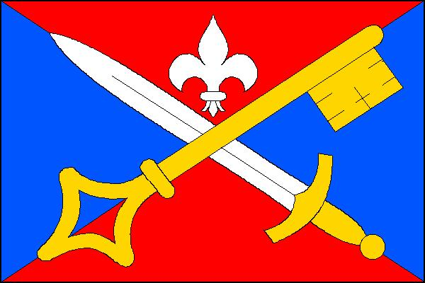 Česky: vlajka obce Luběnice